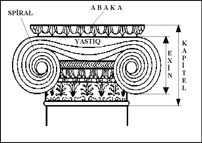 Kapitelin quruluşu.